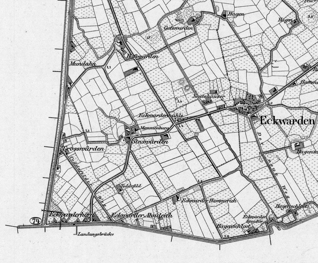 Location of Eckwarderhörn